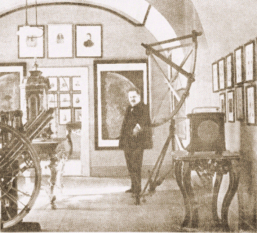 Weinek László a fotografikus asztrometriai módszerek úttörője.